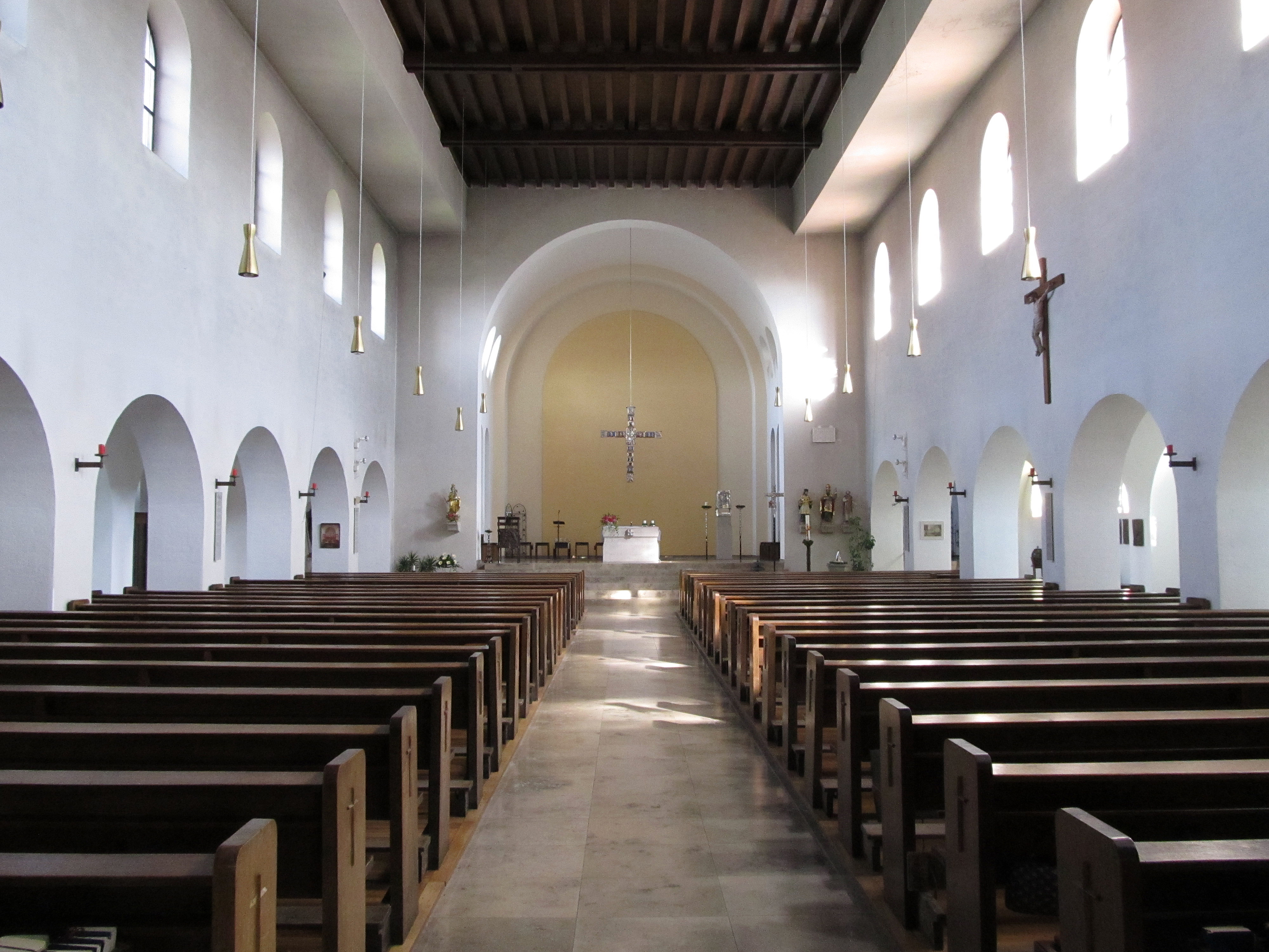 Blick ins Innere der katholischen Pfarrkirche St. Mauritius in Ormesheim, Gemeinde Mandelbachtal, Saarland